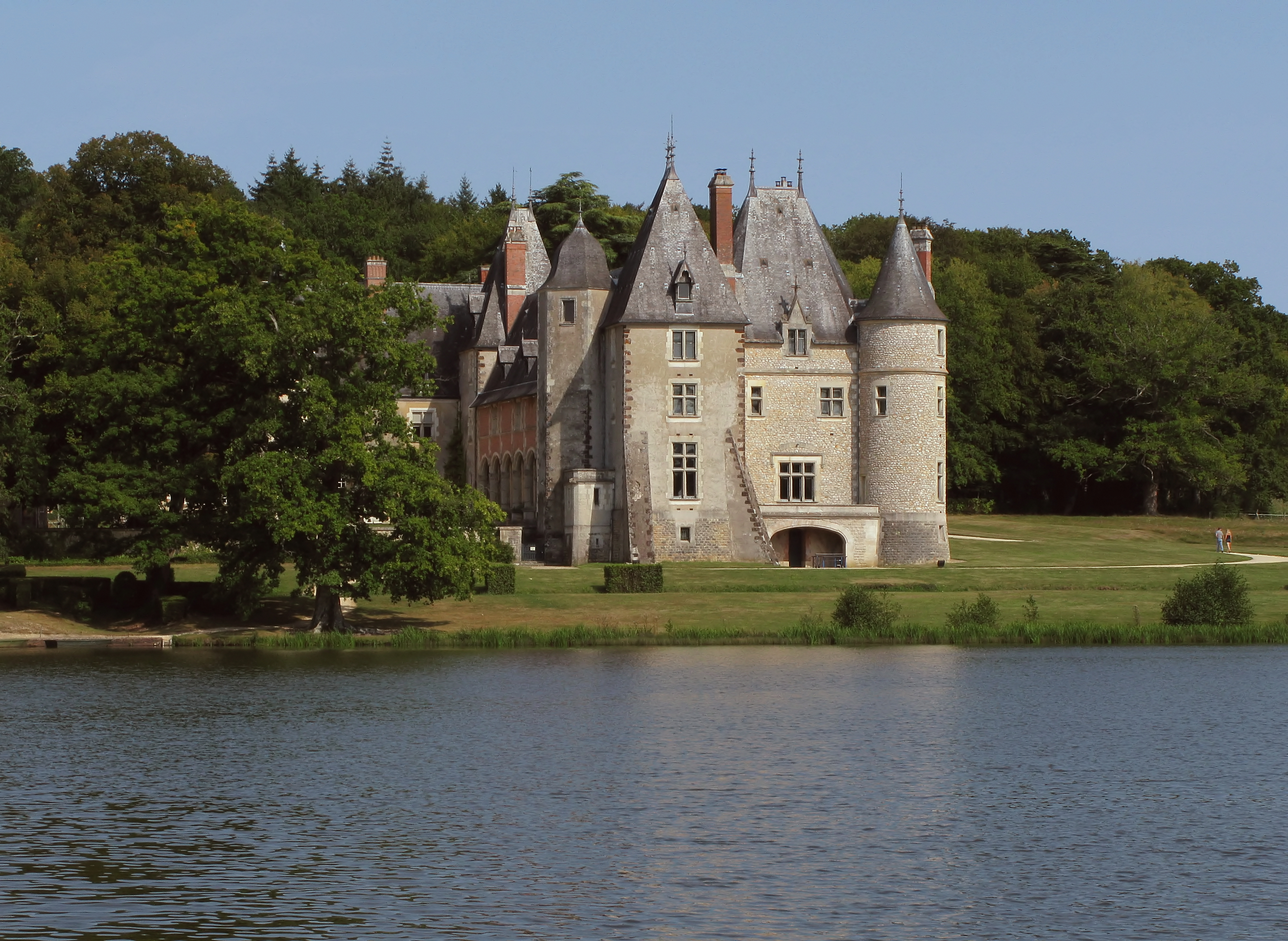 Schloss La Verrerie im französischen Département Cher - Blick über den See auf das Schloss